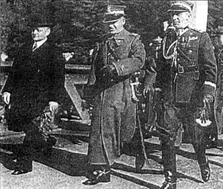 Wojewoda Śląski M. Grażyński, marszałek Polski E. Rydz-Śmigły i gen. Wł. Bortnowski w Czeskim Cieszynie 12 października 1938 r.